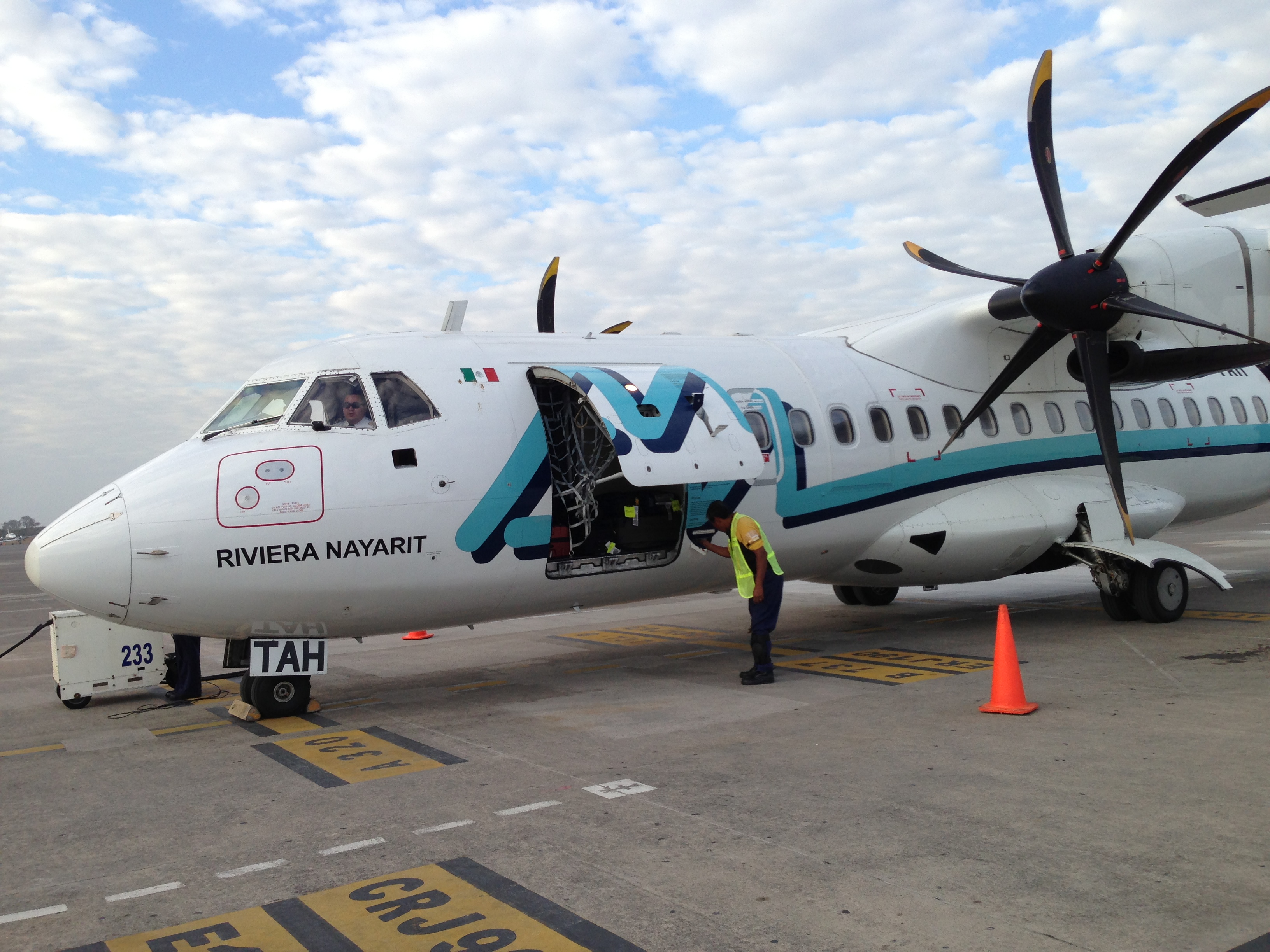 ATR42 de Aeromar en Veracruz